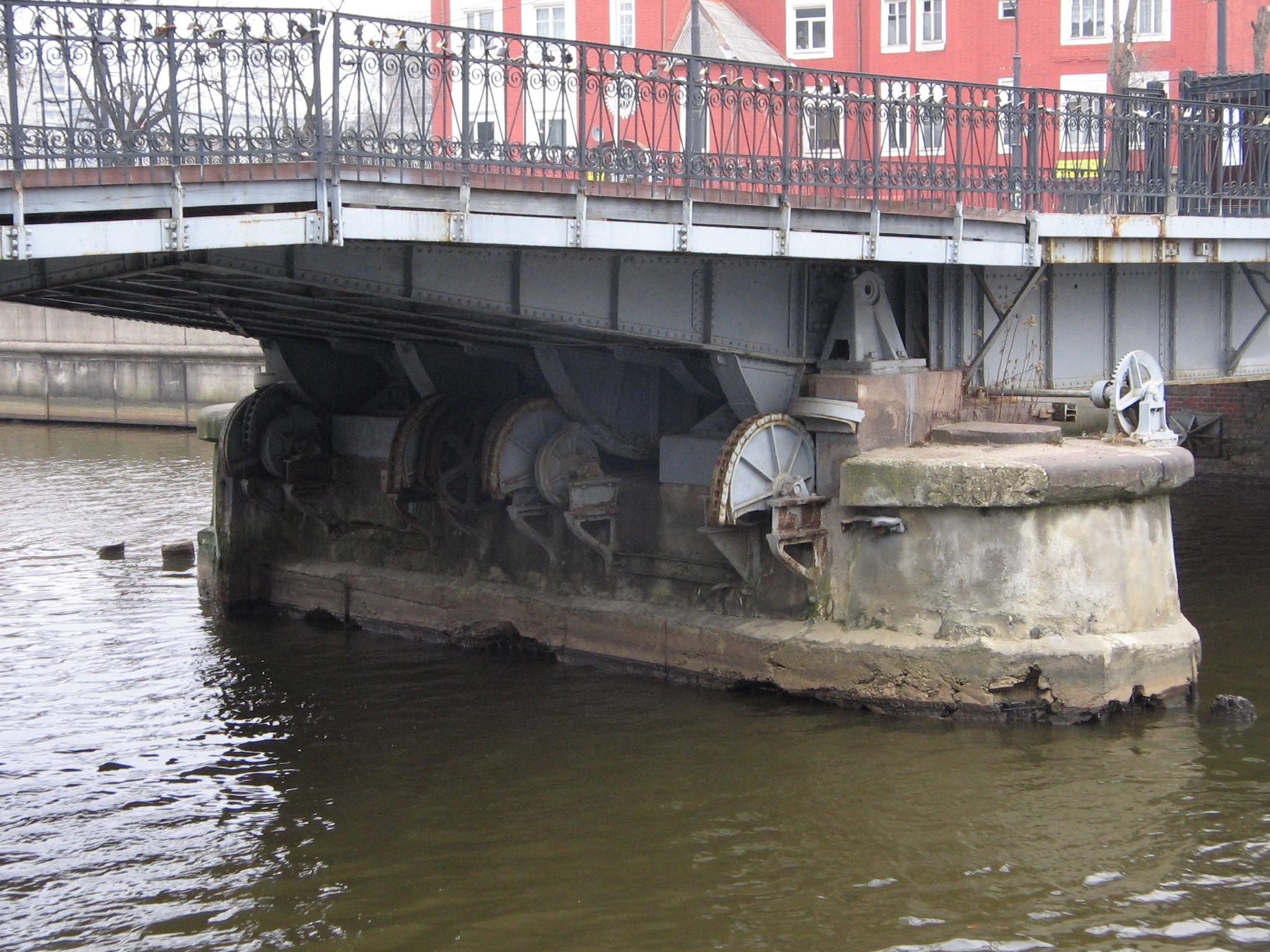 Медовый мост в городе Калининград, Россия, 26 декабря 2007. Остатки разводного механизма.